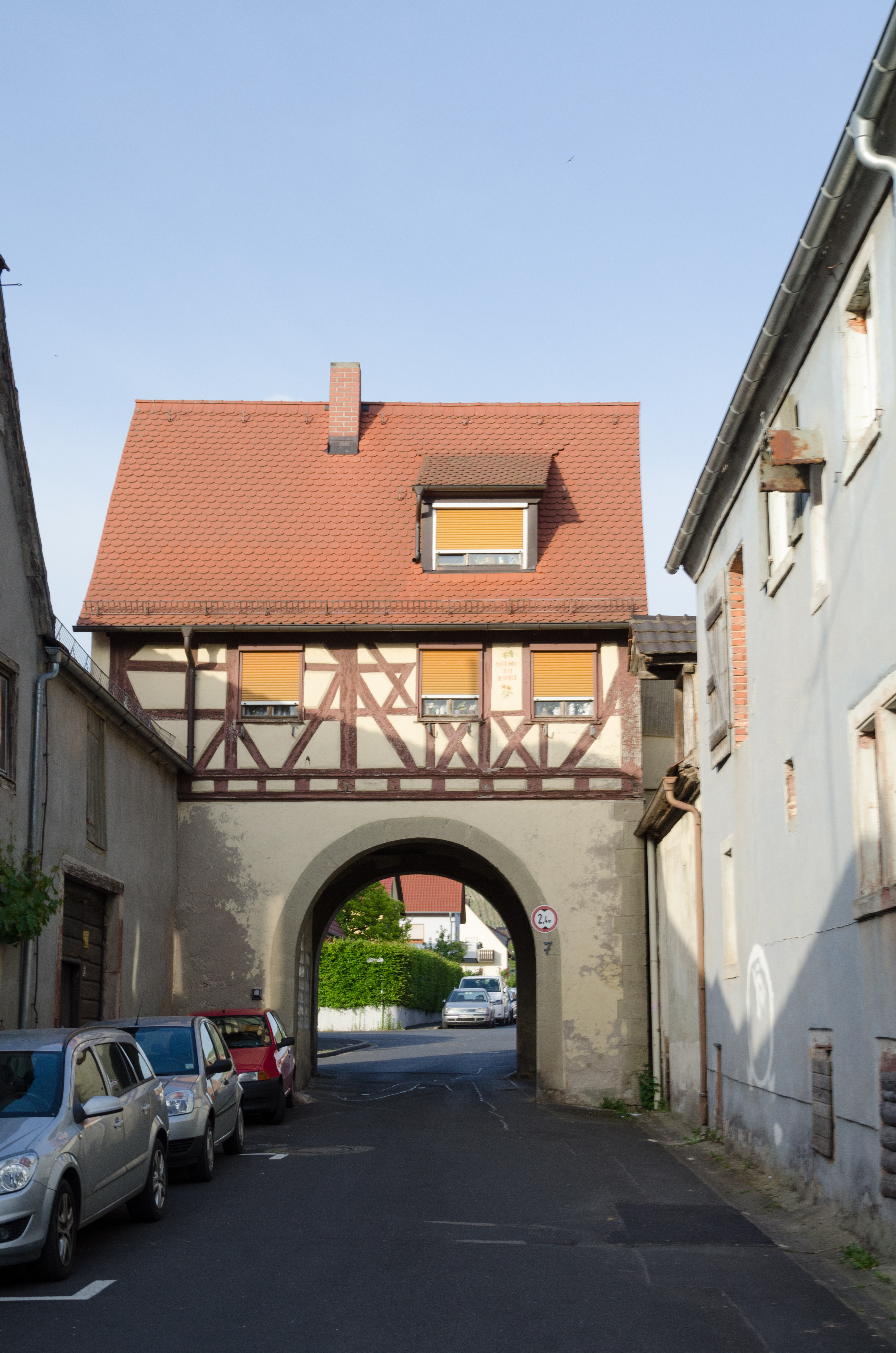 Retzstadter Tor in Thüngersheim